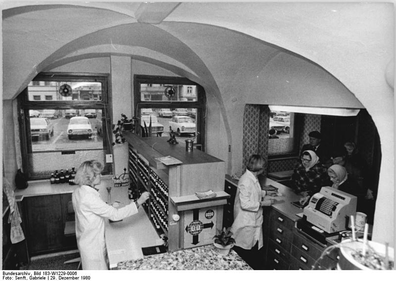 Cottbus, "Löwen-Apotheke", Innenansicht ADN-ZB Senft 29.12.80 Cottbus: In der 1568 gegründeten Löwenapotheke am Cottbuser Altmarkt werden noch heute Kunden bedient. In den 60er Jahren wurde der Verkaufsraum mit dem schönen Deckengewölbe restauriert. Das Gebäude und das Hinterhaus stehen unter Denkmalschutz. (siehe 5 und 7N)